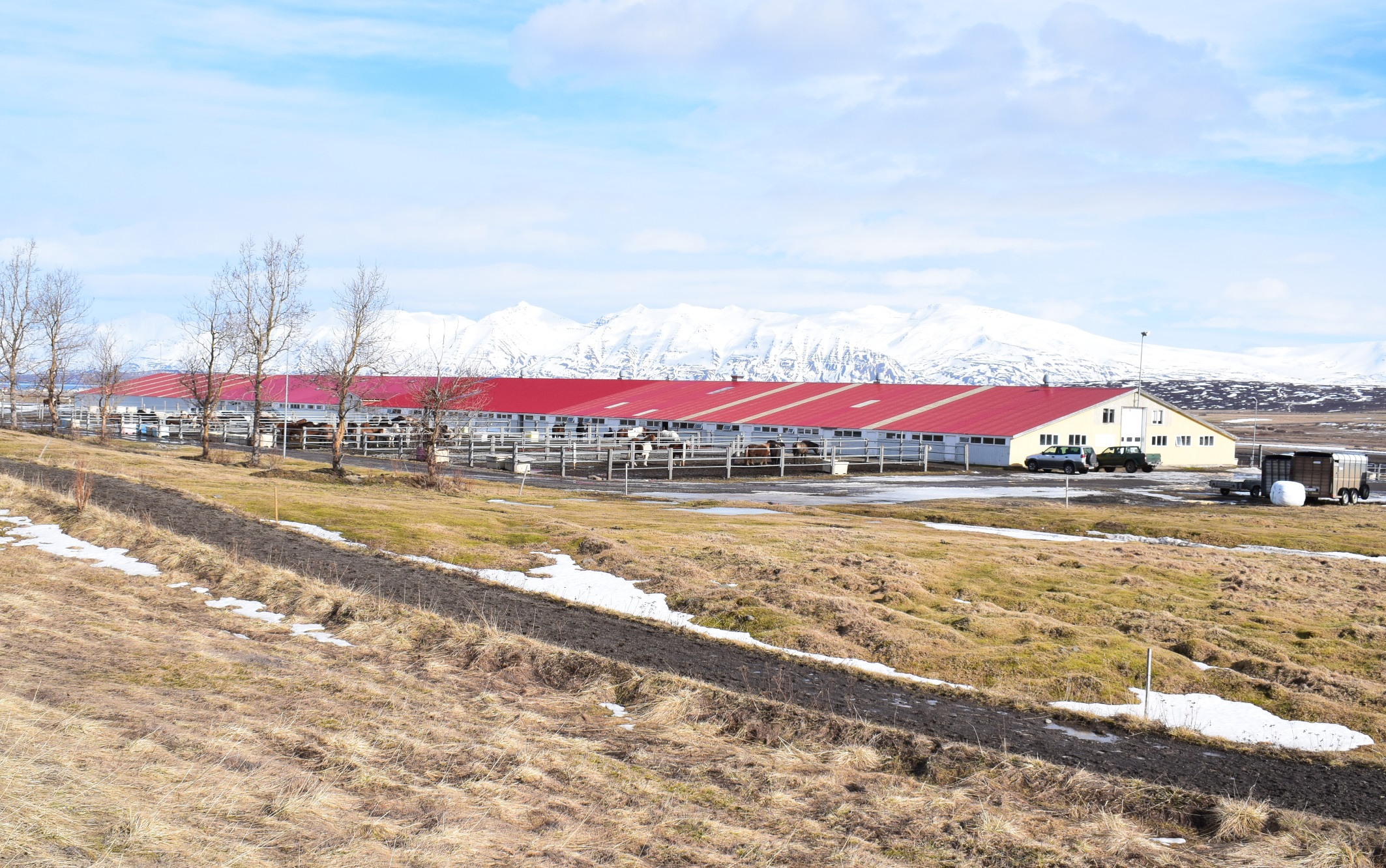 Hringsholt í Svarfaðardal